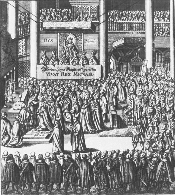 Coronation of Michael Korybut Wiśniowiecki.